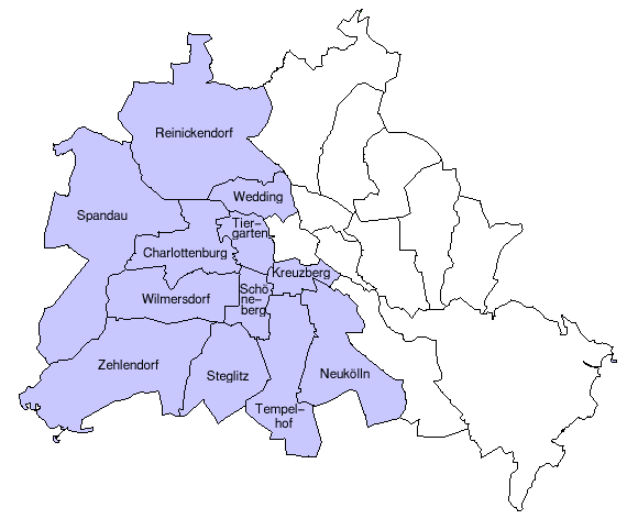 Quartieri di Berlino Ovest Image:WestBerlinBoroughs.png